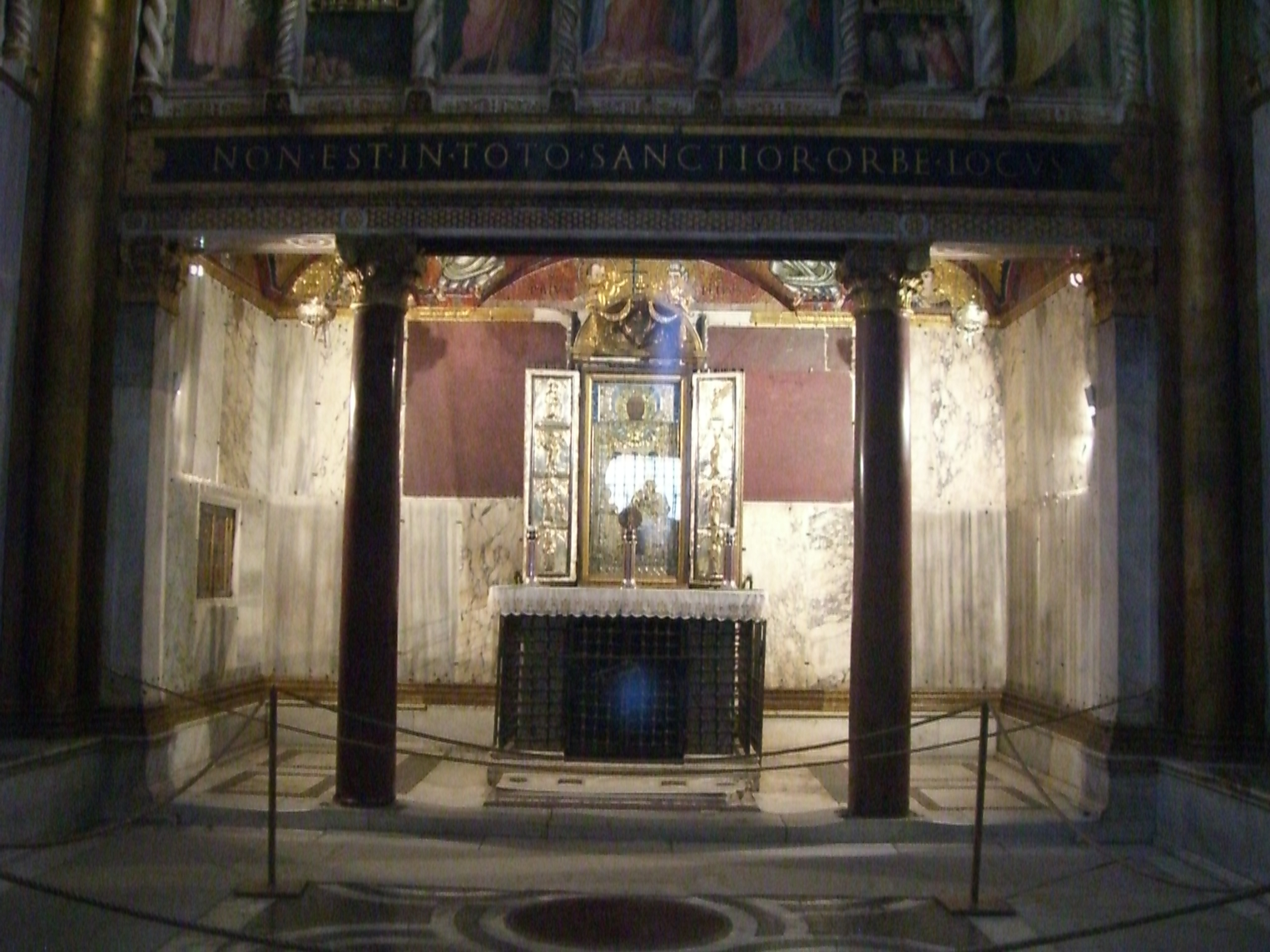 Sancta Santorum, Roma